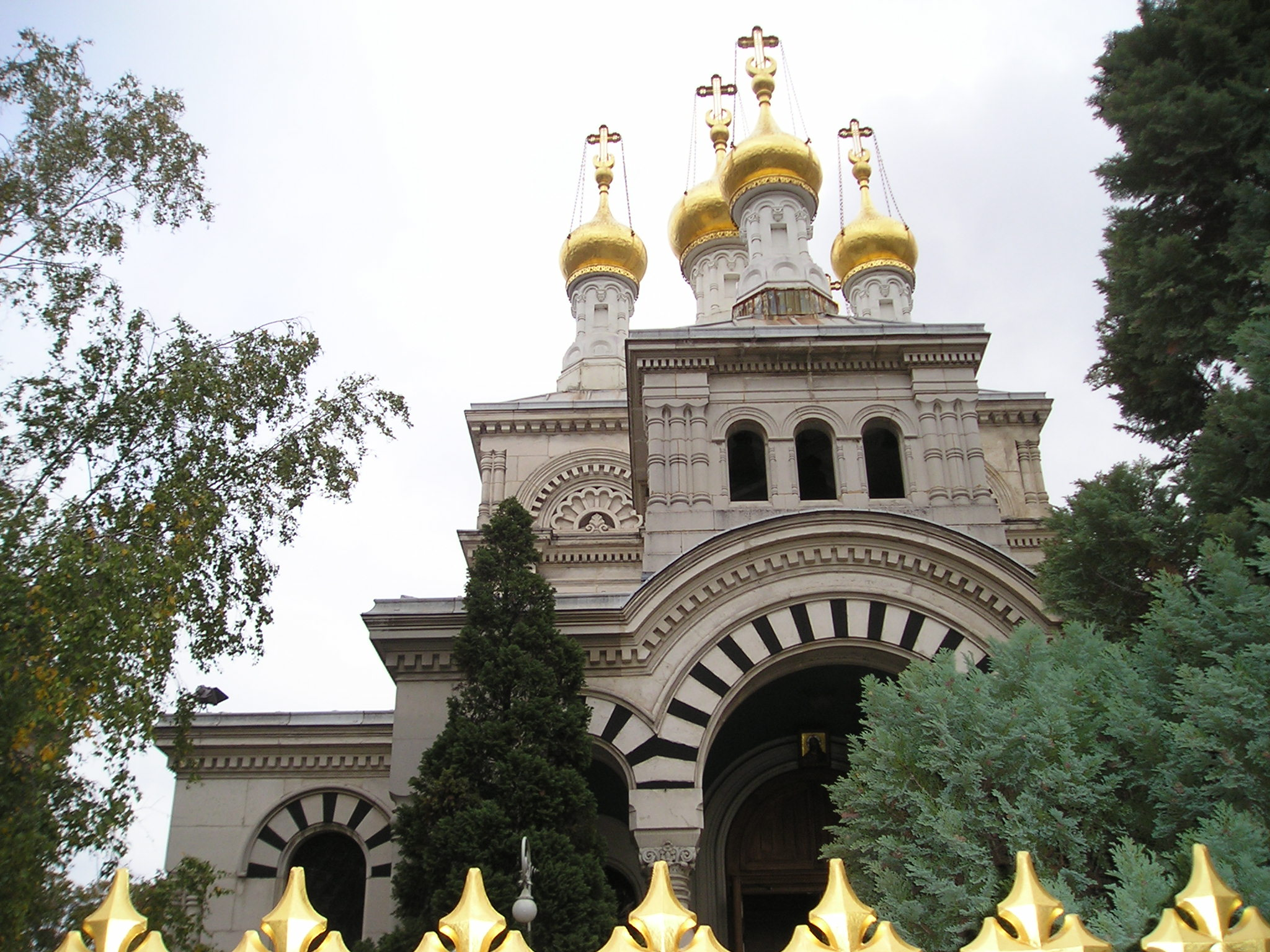 Chiesa ortodossa russa di Ginevra, autore foto Massimo Macconi, 30.10.2006.